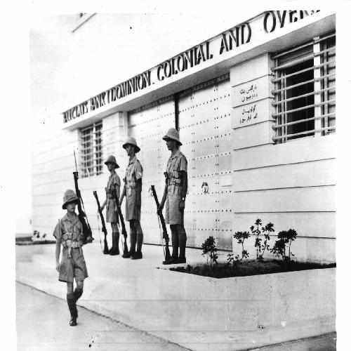 המאורעות בארץ ישראל, 1938 - חיפה שמירה על הבנקים ע"י חיילים בריטיים